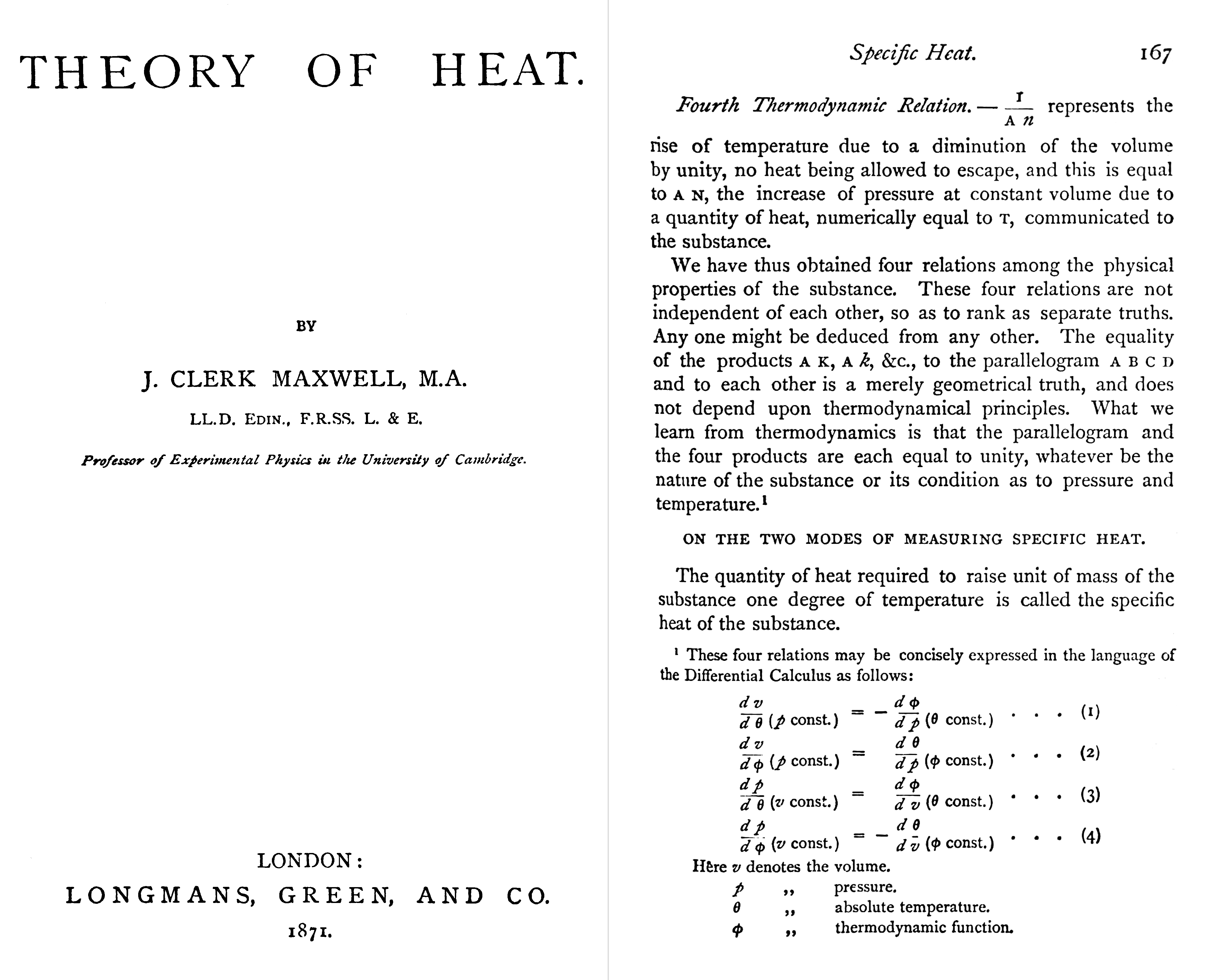 Первая публикация термодинамических уравнений Максвелла